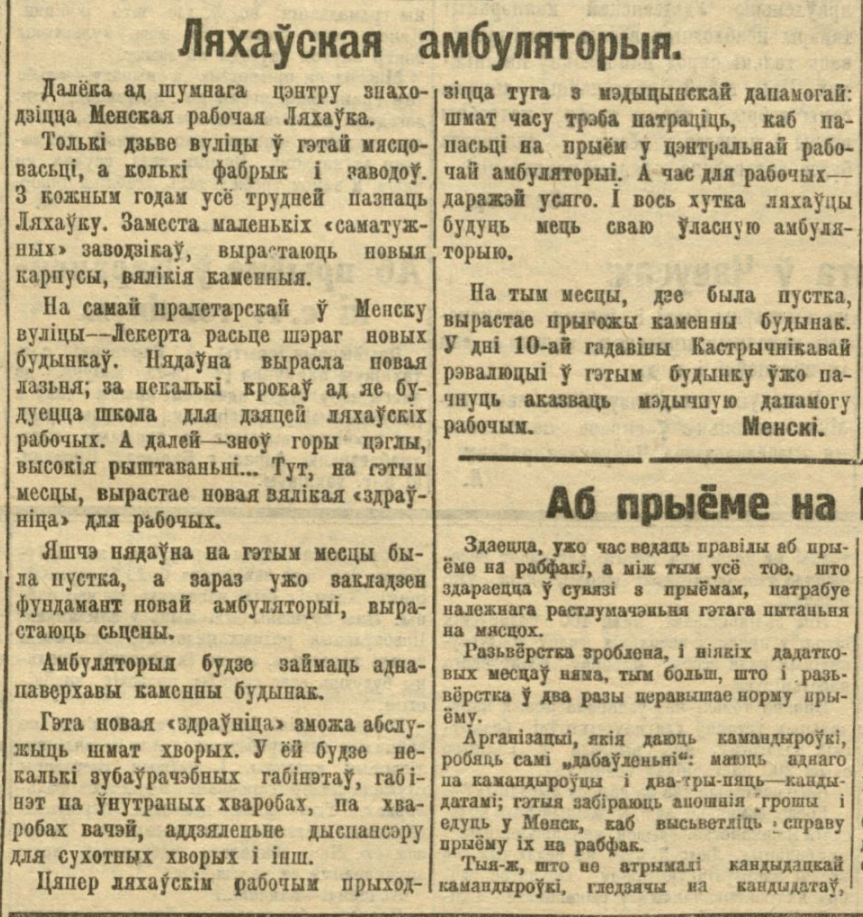 Нататка пра Ляхаўскую амбулаторыю ў газеце Савецкая Беларусь № 171, 1927.